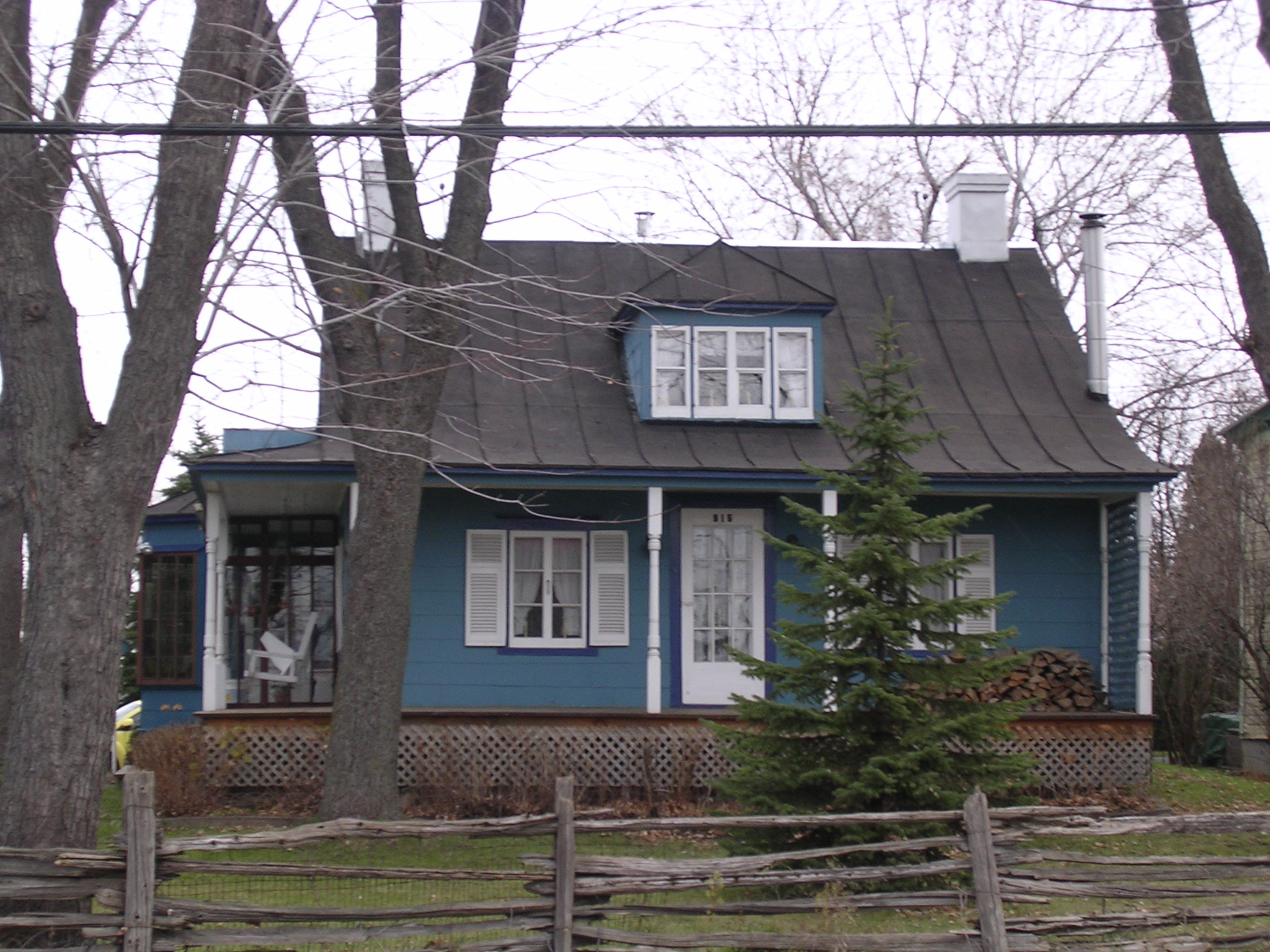 Maison du meunier du moulin à vent Grenier, situé à Repentigny (Lanaudière, Québec). Il est connu aussi sous le nom de Moulin Lebeau. La maison du meunier est située en face du moulin, de l'autre côté de la rue. Moulin à farine; moulin Grenier; moulin Lebeau.